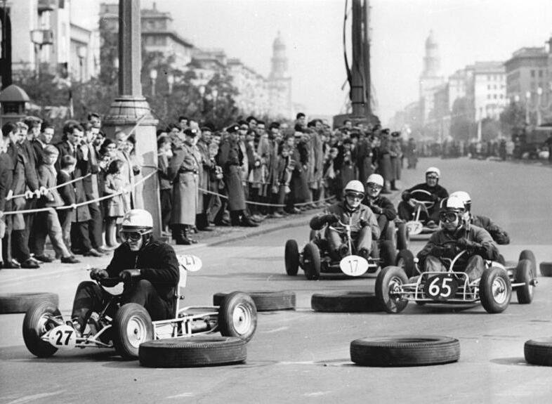 Zentralbild Kohls 7.10.1963 14. Jahrestag der DDR: 5. Berliner K-Wagen-Rennen Anläßlich des Jahrestages unserer Republik wurde am Strausberger Platz das 5. Berliner K-Wagen-Rennen um den Pokal der Nationalen Front am 7.10.1963 ausgetragen. UBz: Mit Spannung verfolgen die Zuschauer in der Karl-Marx-Allee den Kampf um die Plätze. Noch führt im 4. Vorlauf M. Thomas (GST DKV) vor M. Menosek (MC Freiberg).